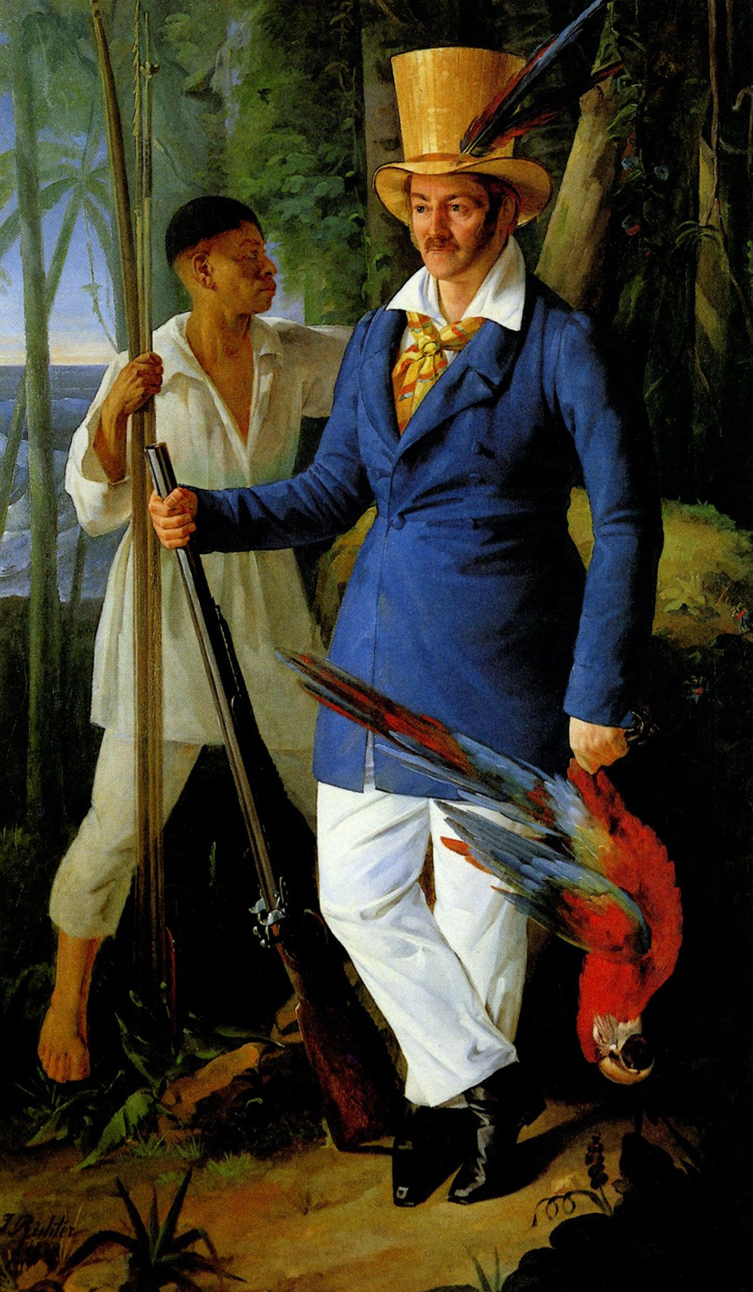 Der Botokude-Indianer Joachim Quäck (Quäck = portugiesisch: Kuêk, ursprünglich: Nuguäck) (* vermutlich um 1800 im brasilianischen Bundesstaat Minas Gerais in Brasilien; † 1. Juni 1834 in Neuwied) traf 1817 als Minderjähriger den deutschen Entdecker, Ethnologen, Zoologen und Naturforscher Prinz Maximilian zu Wied-Neuwied in Brasilien. Quäck wurde für Maximilian zum einheimischen Reisebegleiter, der ihm das für seine Forschungen notwendige Hintergrundwissen vermittelte. Maximilian ließ ihn nach Europa nachkommen. Am 12. Februar 1818 kam Quäck in Neuwied an. Dort arbeitete er für Maximilian als dessen persönlicher Kammerdiener. Quäck verstarb im Alter von 34 Jahren am 1. Juni 1834 um 9 Uhr morgens an einer Leberentzündung und wurde am 3. Juni 1834 (vermutlich auf dem Alten Friedhof von Neuwied) katholisch beerdigt.